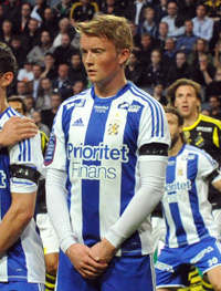 Sam Larsson